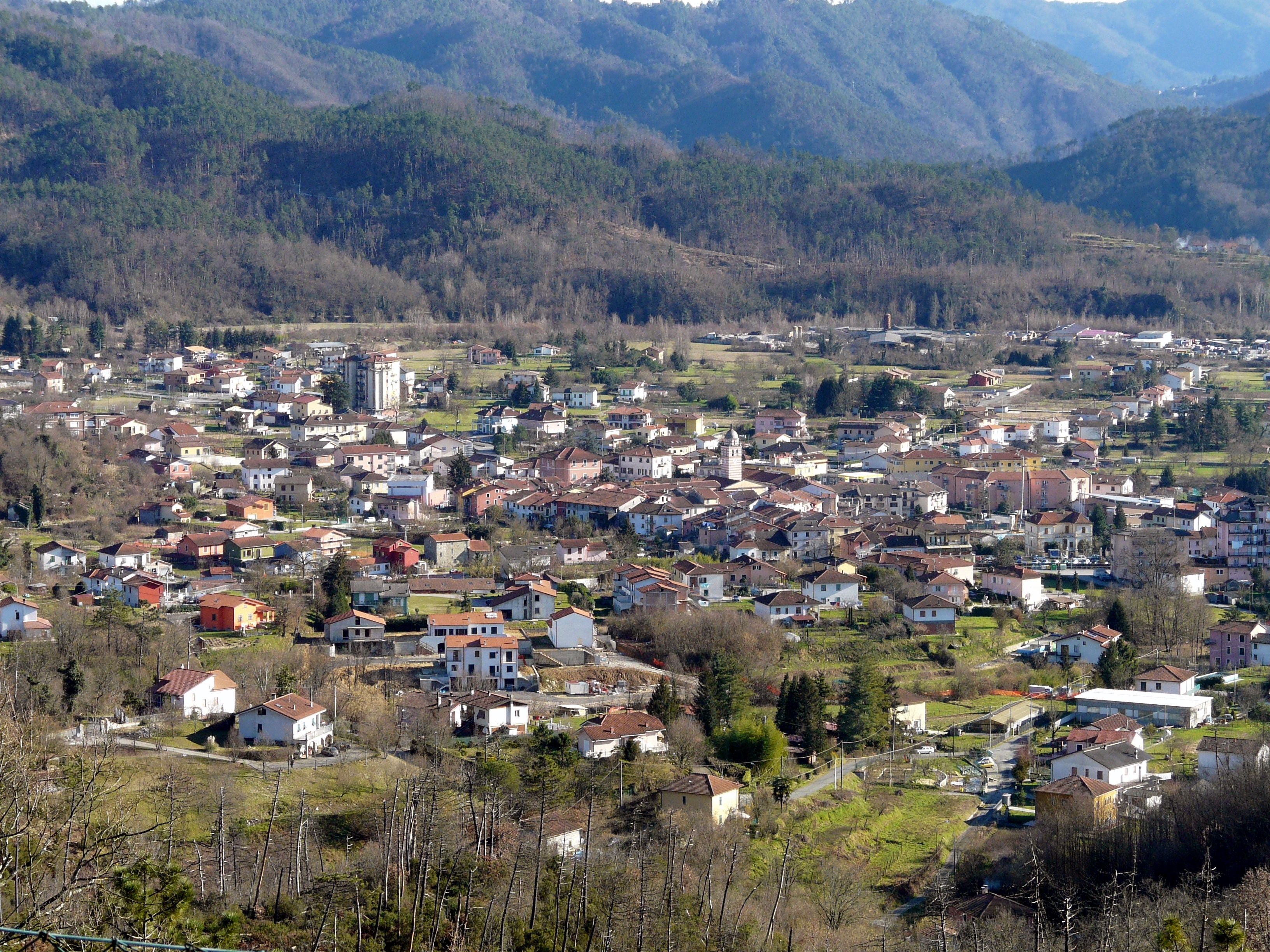 Panorama da Bozzolo di Brugnato, Liguria, Italia